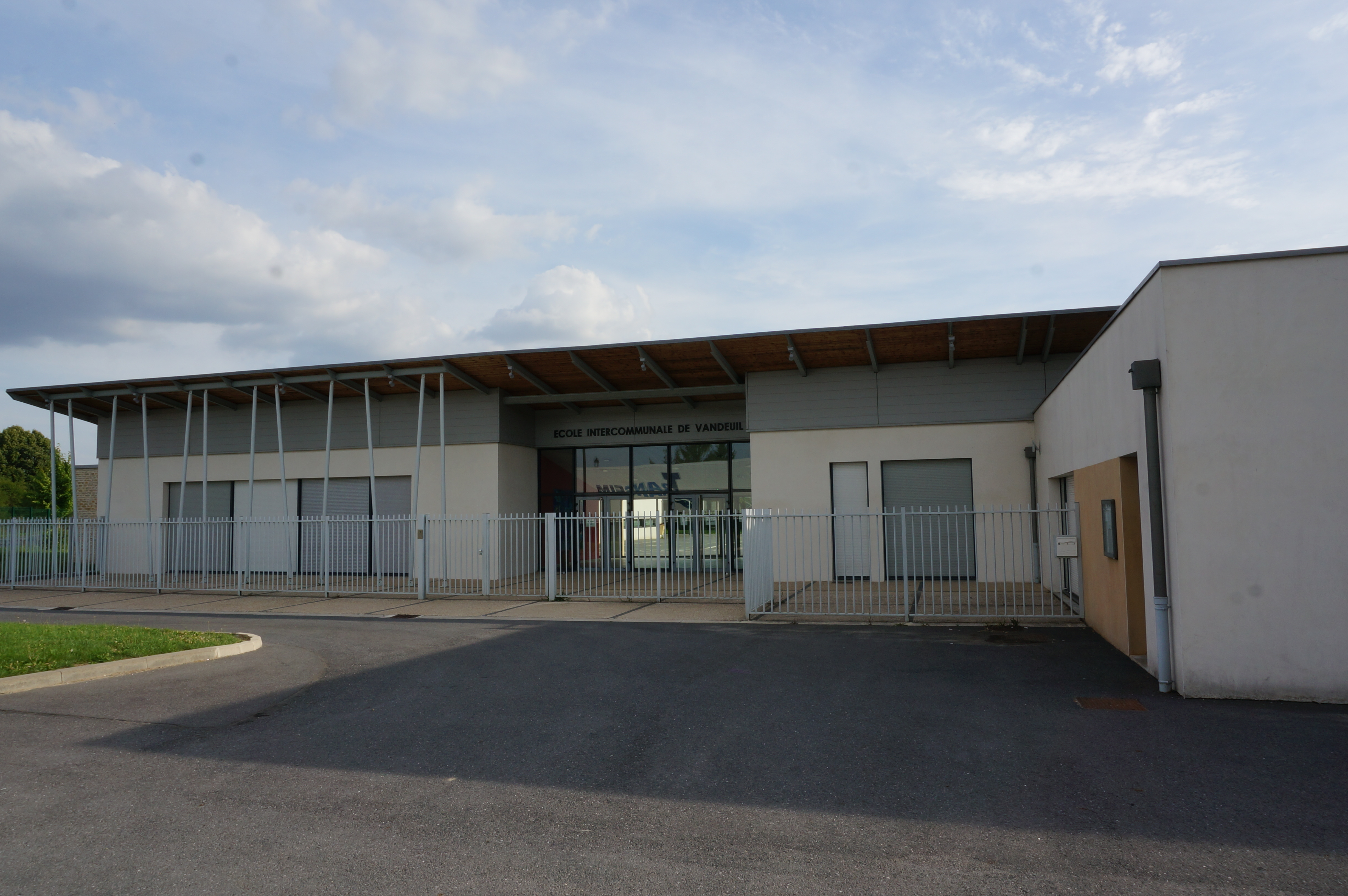 à Vandeuil.